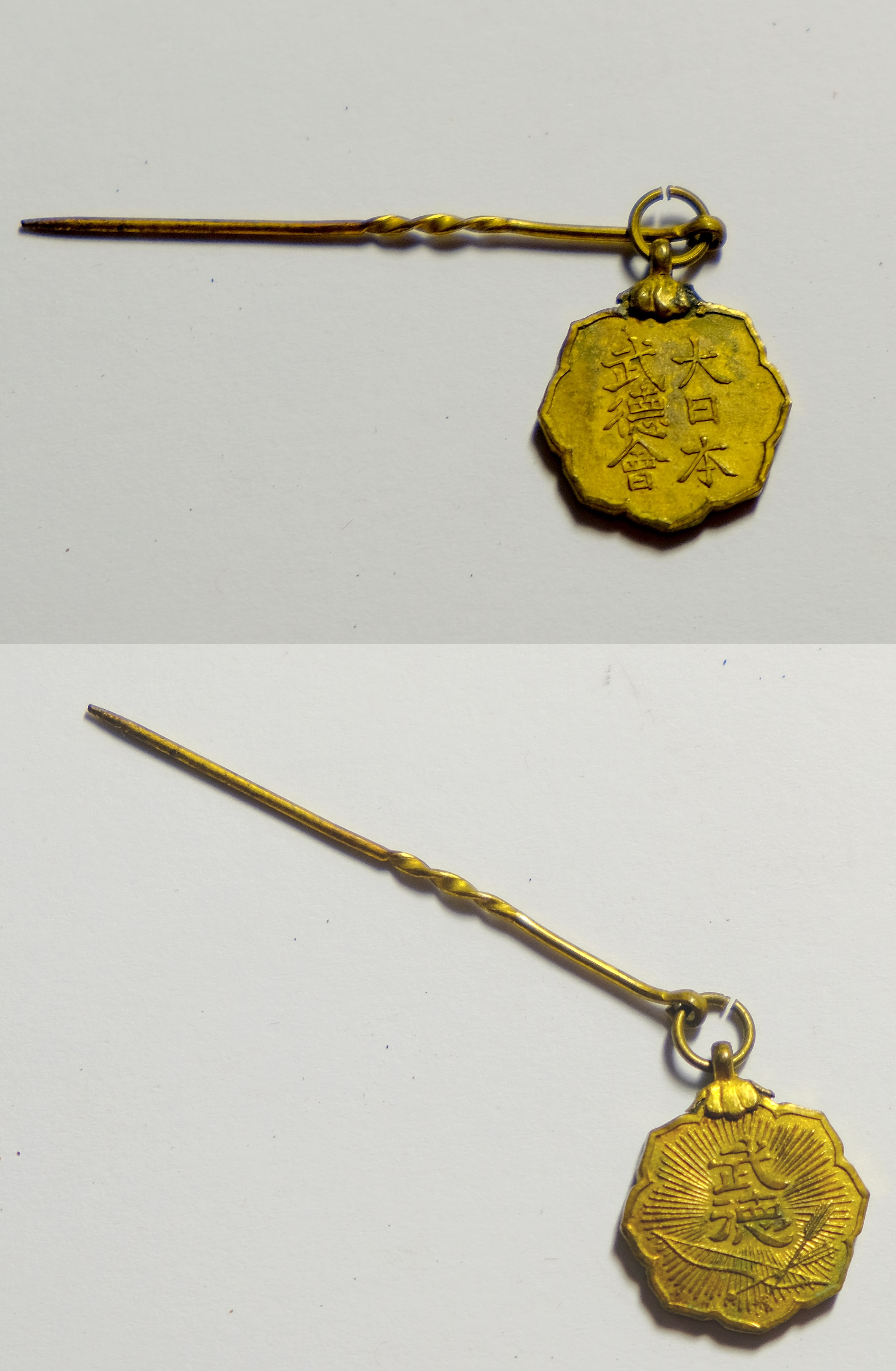 2019 The Medal of Dainippon Butokukai Anterior 大日本武徳会飾章